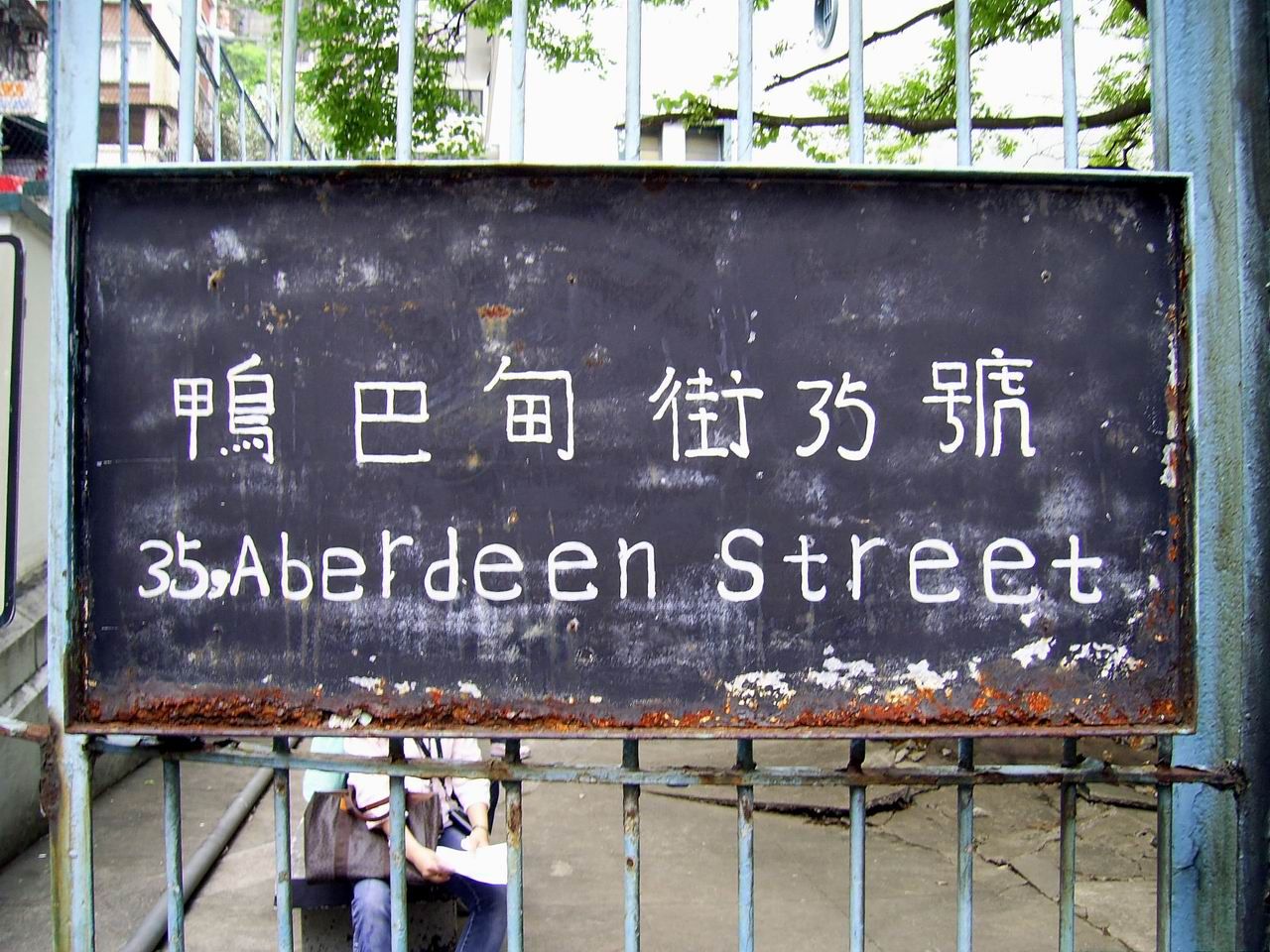 荷李活道警察宿舍門牌